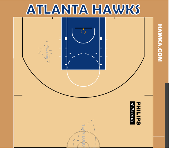 ホークスホームコート配色